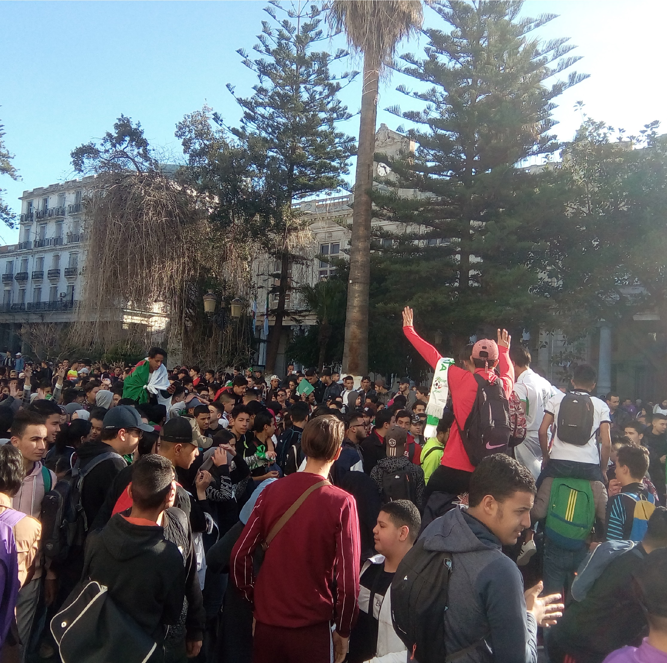 ساحة الثورة اثناء الحراك في مدينة عنابة